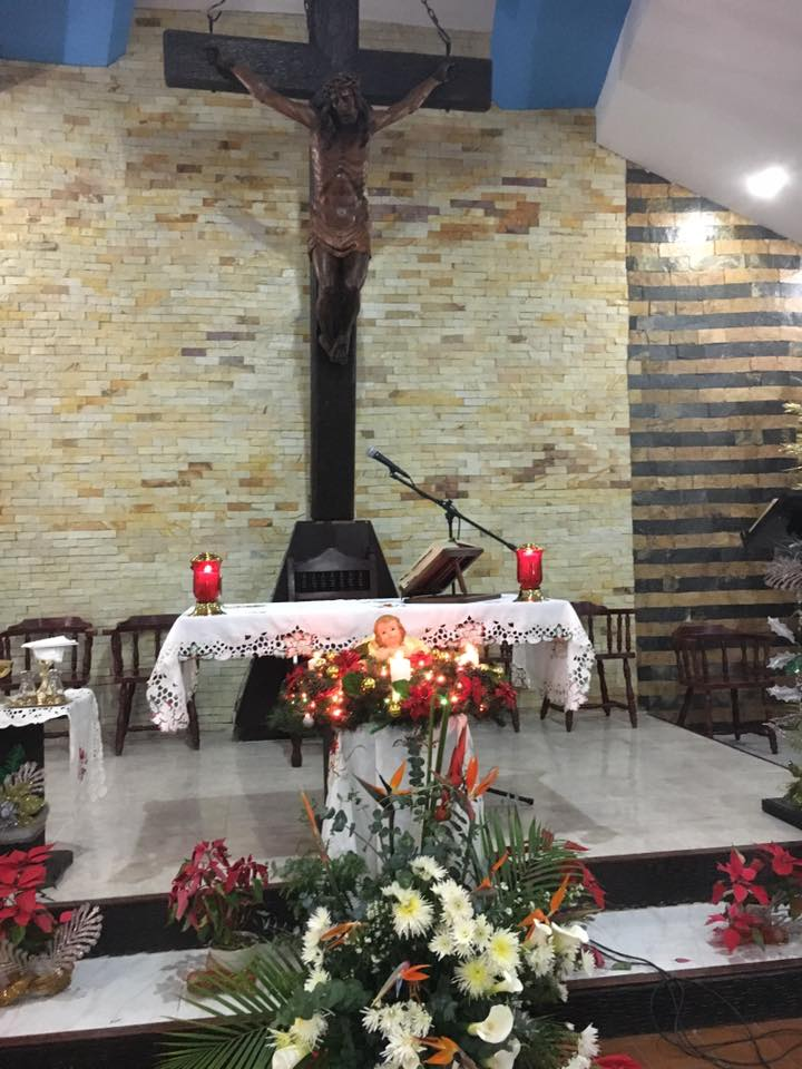 Iglesia Parroquia Nuestra Señora de la Luz Coche Caracas Venezuela, cruz